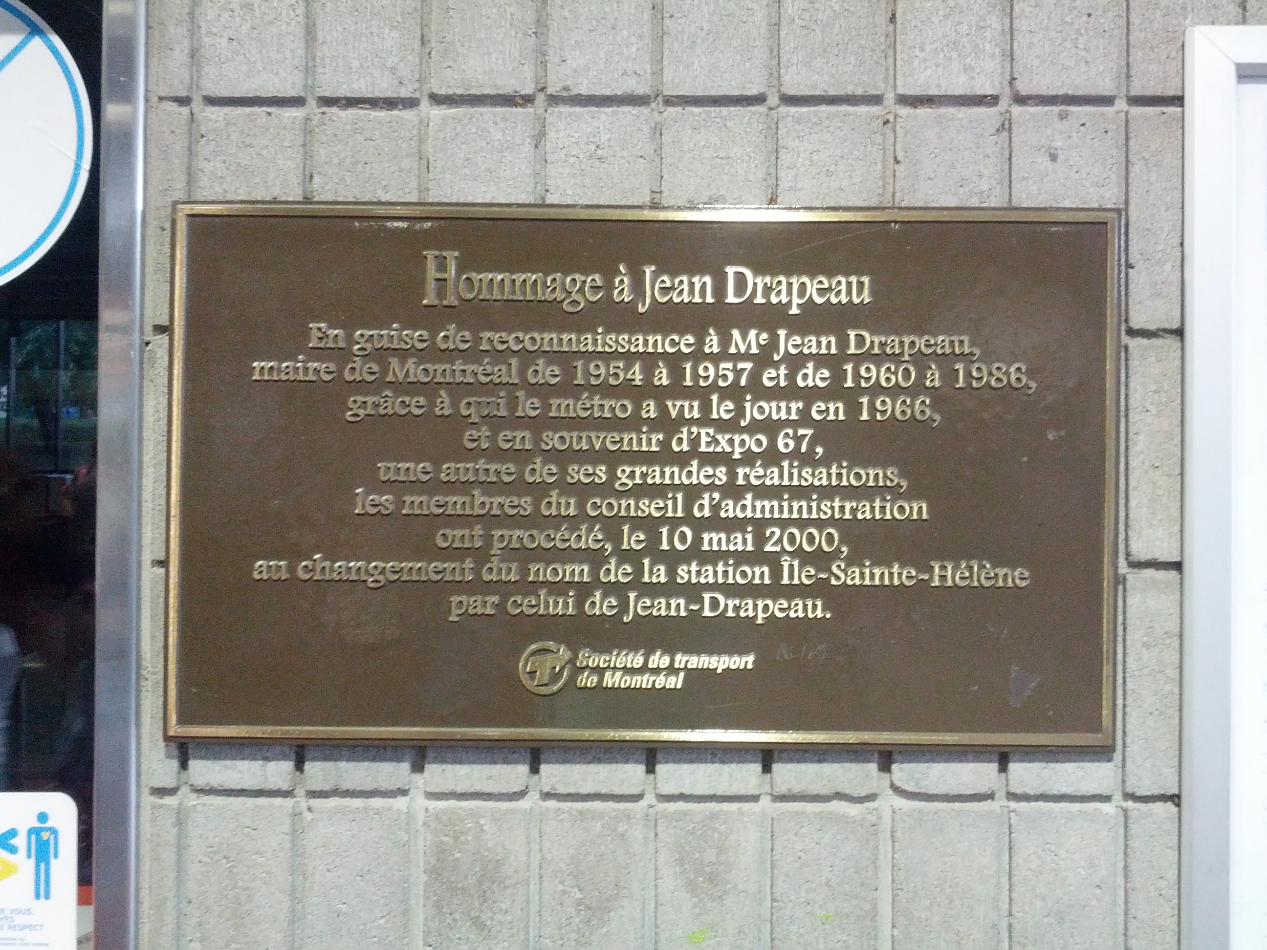 Placa de Jean Drapeau na estação de metrô Jean Drapeau, em Montreal.